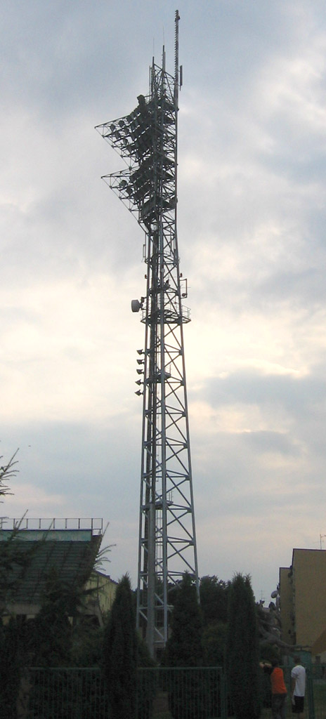 Jeden z jupiterów oświetlających Stadion Stali Mielec.